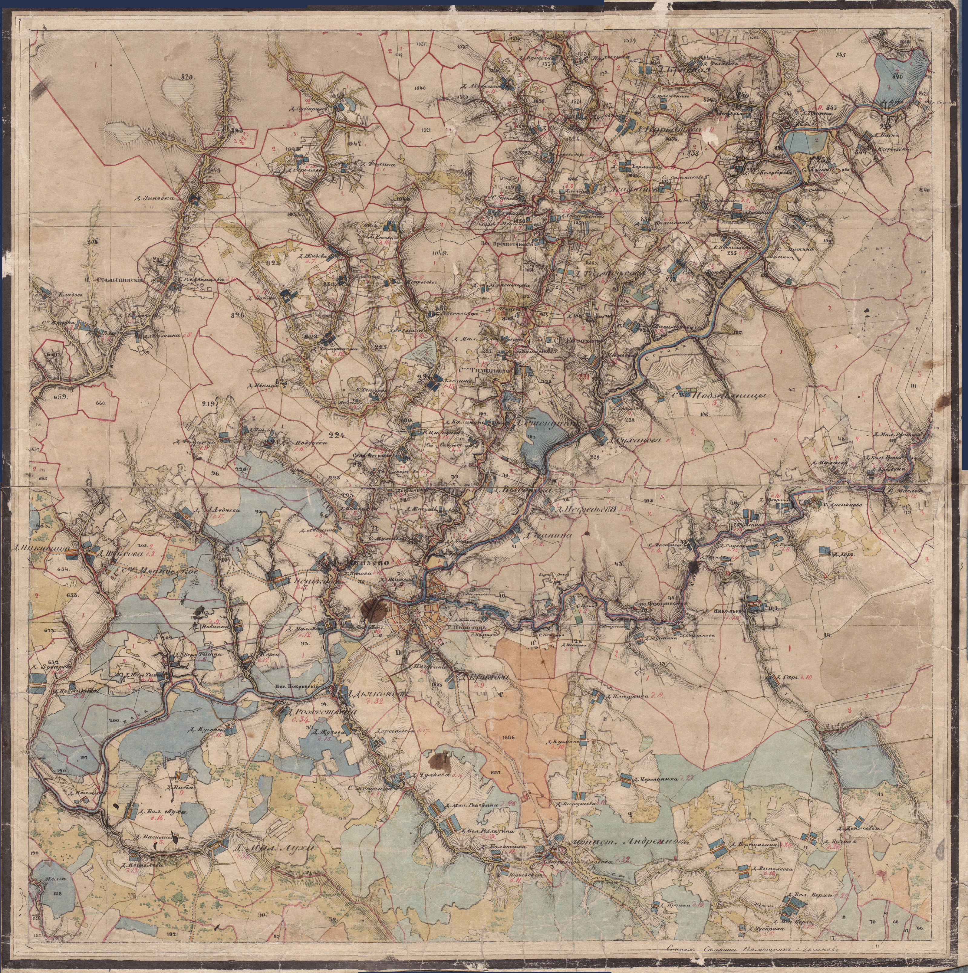 Пошехонье и его окрестности Категория:Изображения:Атлас Ярославской губернии 1858 года